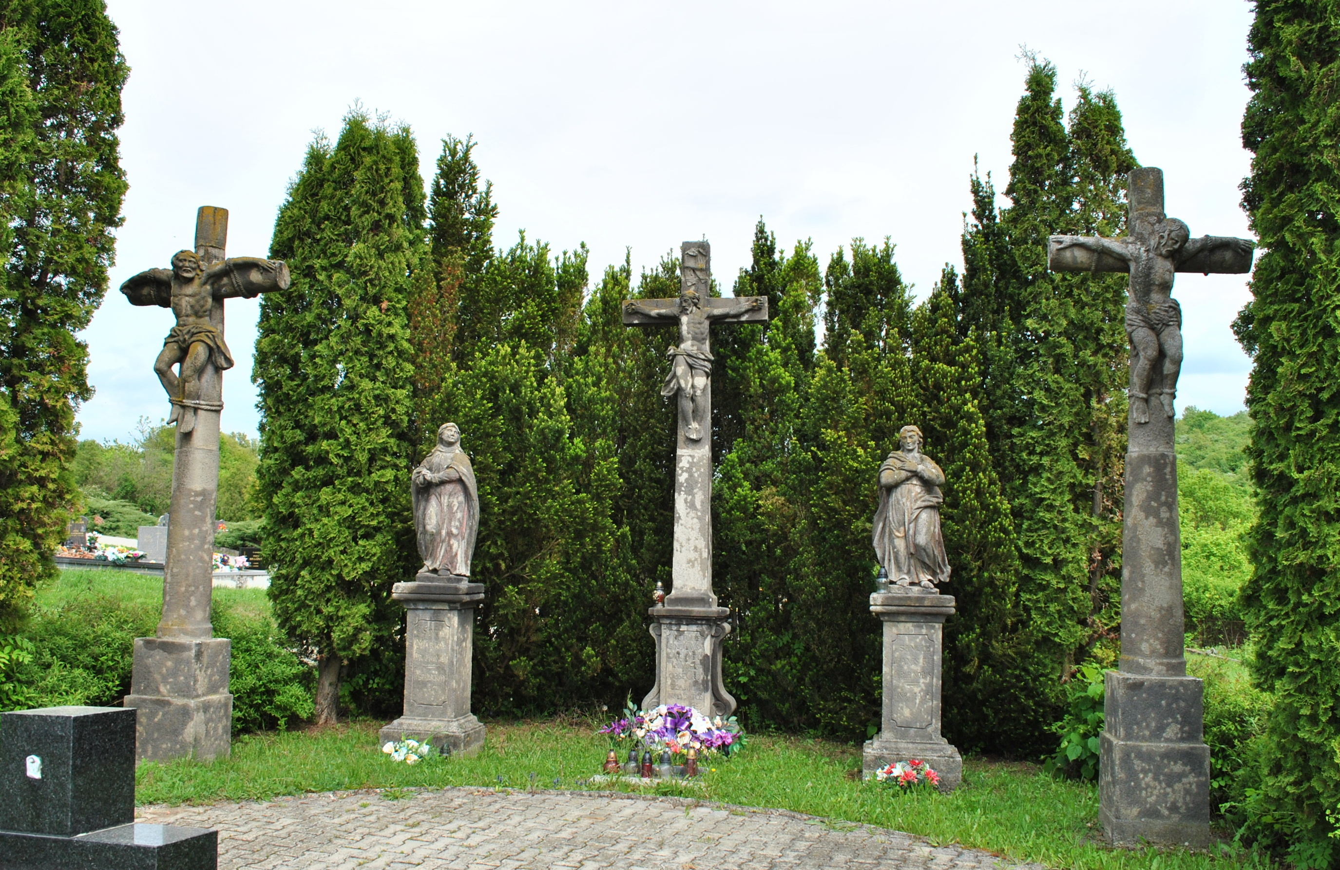 Socha